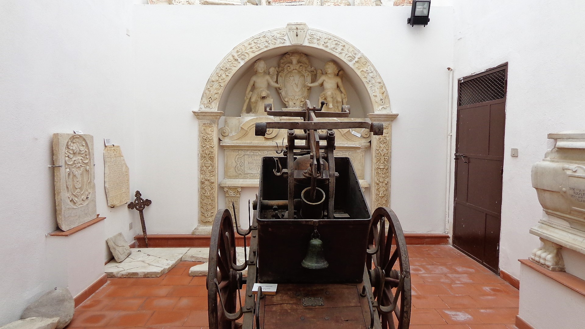 Monumento funebre